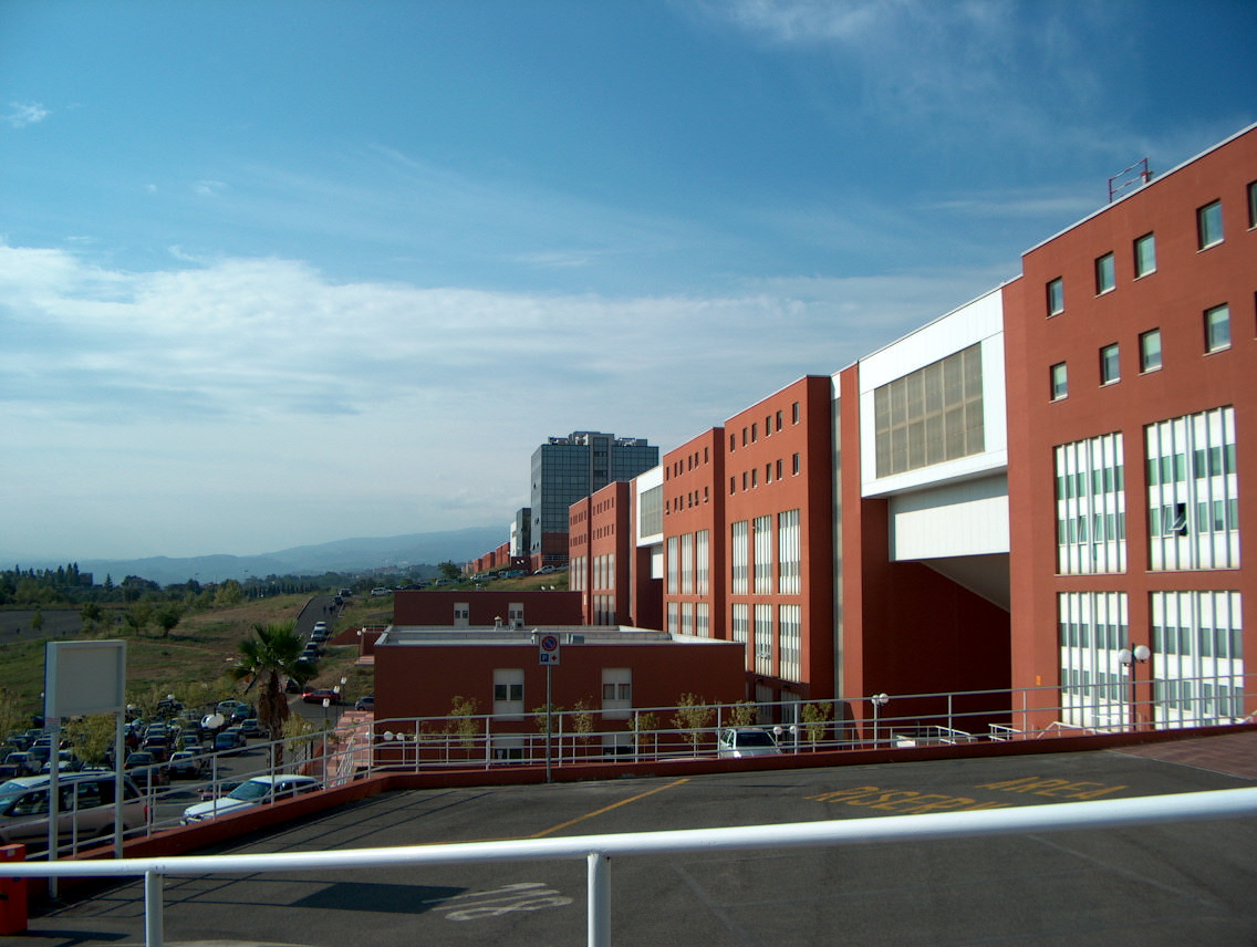 Università della Calabria Rende